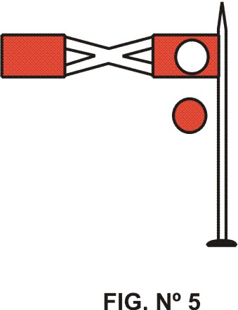 Es un dibujo de una señal argentina que autoriza la entrada de trenes a vía contraria.